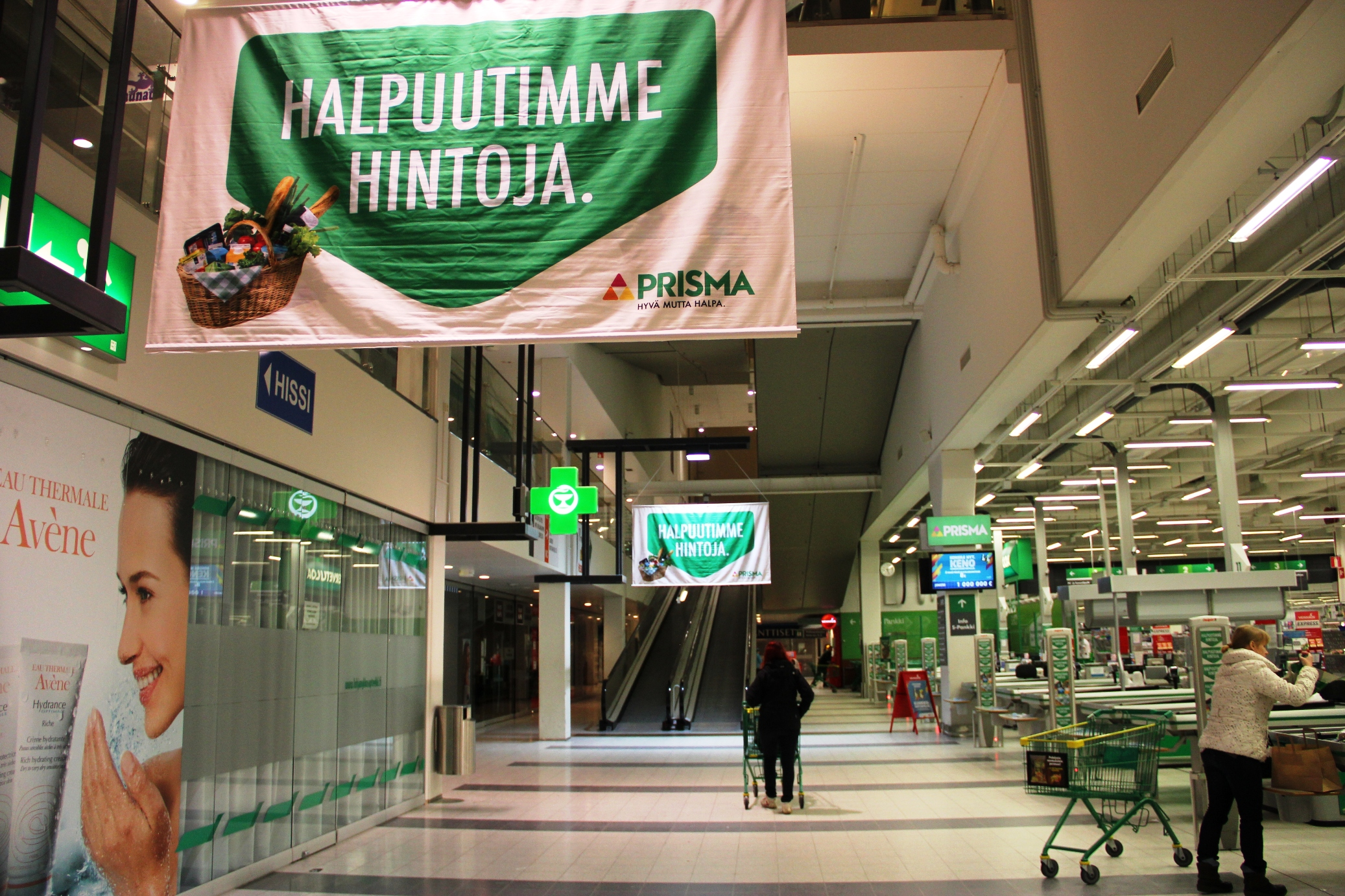 Lohjan Prisma Hypermarket, Laurinkatu, Lohja